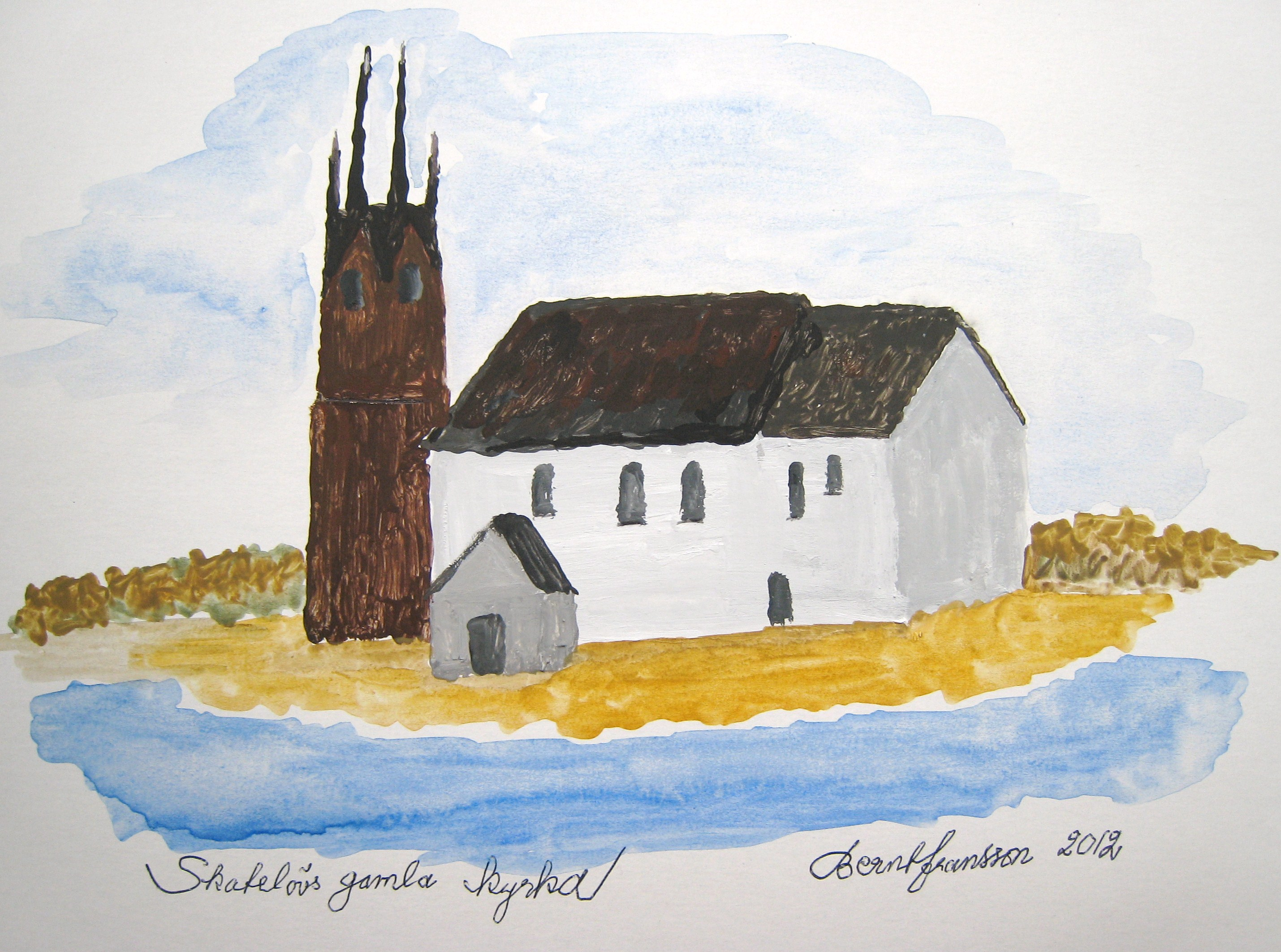 Skatelövs gamla kyrka.Akvarell efter teckning.